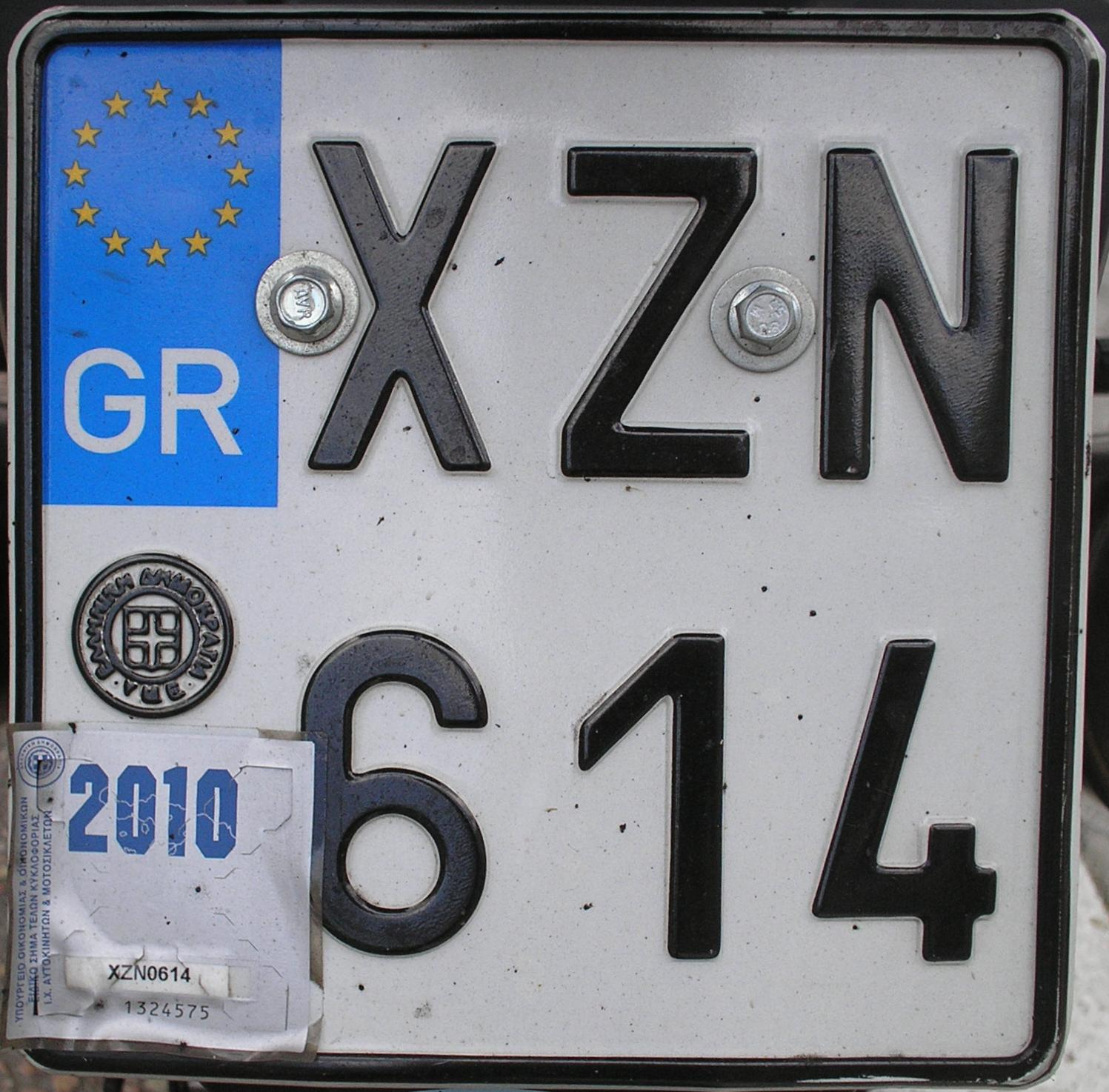 Зображення номерного знаку